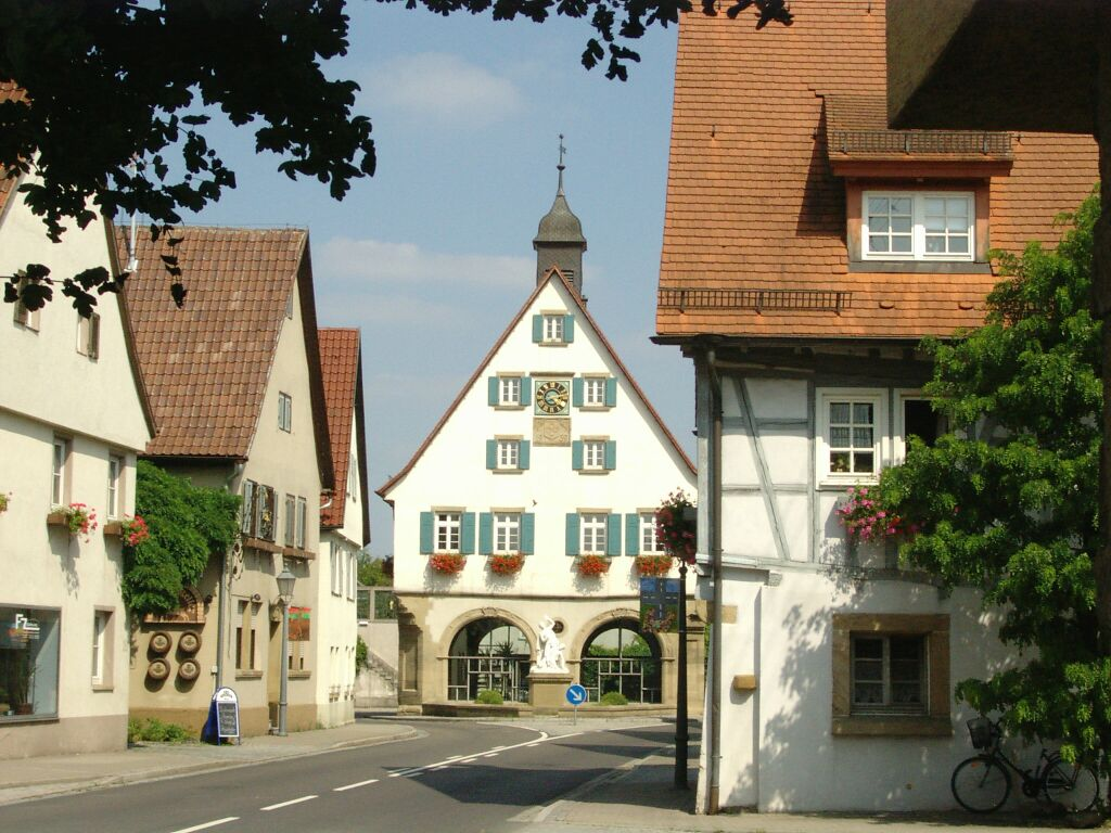 Pleidelsheim (Lkr. Ludwigsburg): Altes Rathaus.